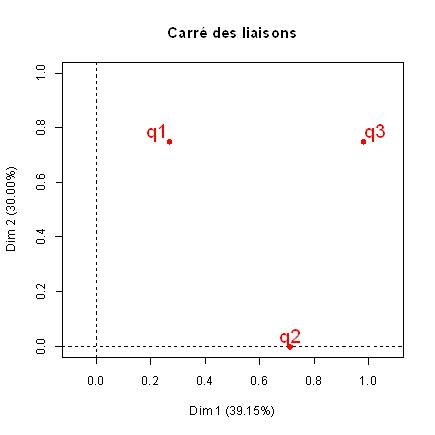 Exemple de carré des liaisons en ACM (via FactoMineR).